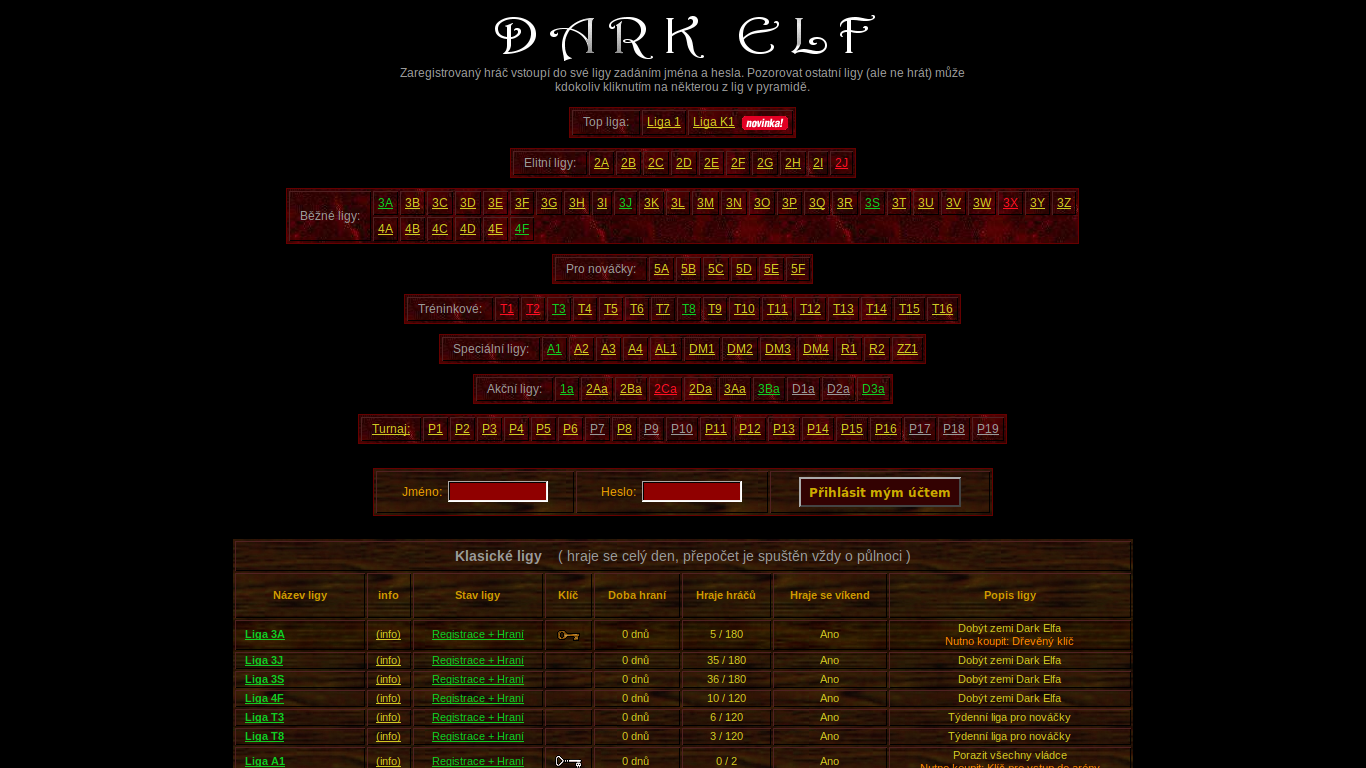 Přehled a výběr herních lig.